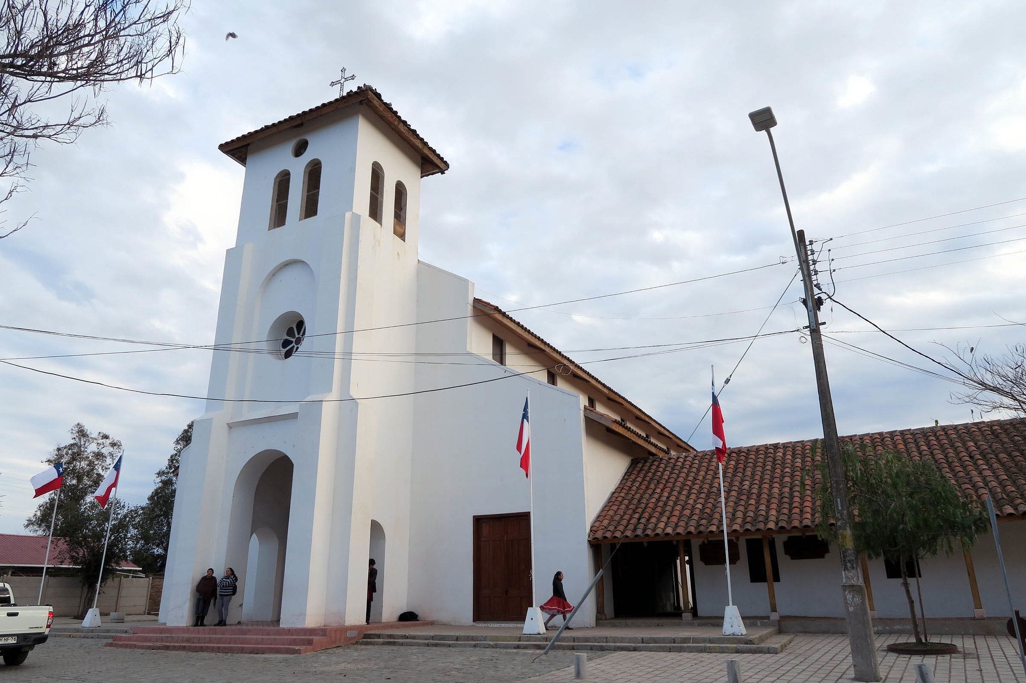 Capilla de Chepica, Sexta región, Chile